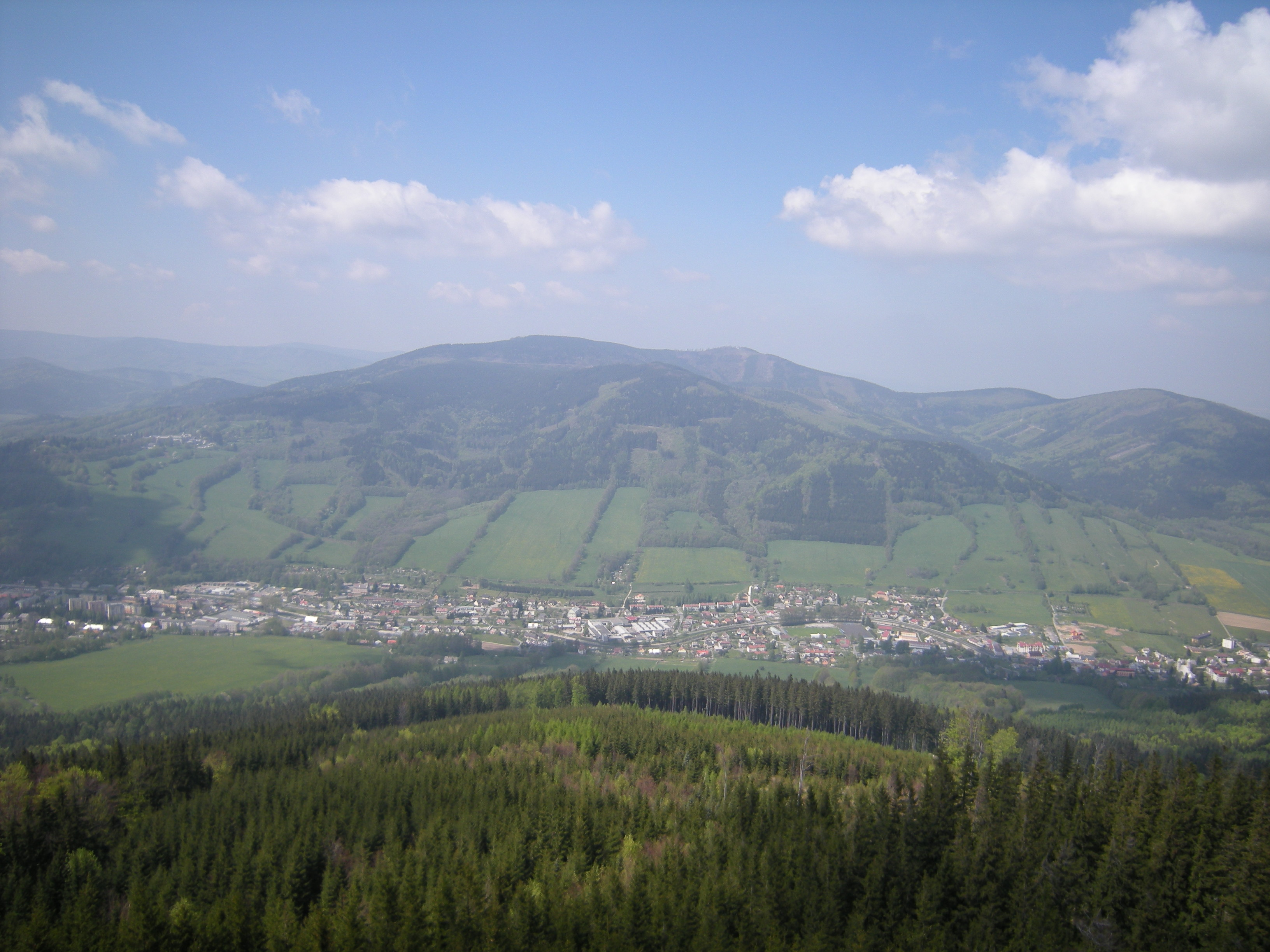 Widok z wieży na Zlaty Chlum na Czeską Wieś.